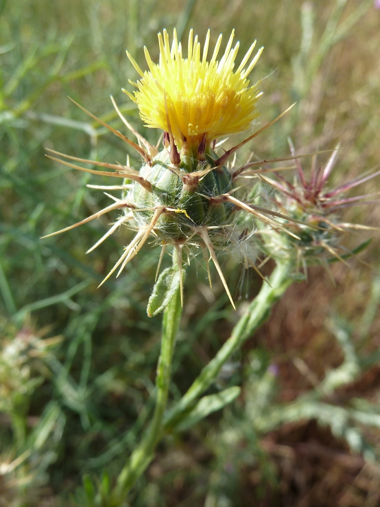 Centaurea melitensis (Abrepuños, cardo escarolado, ...) - Capítulo en antesis - Camino de la Azarbe de Patricio, Albatera (Provincia de Alicante, España).